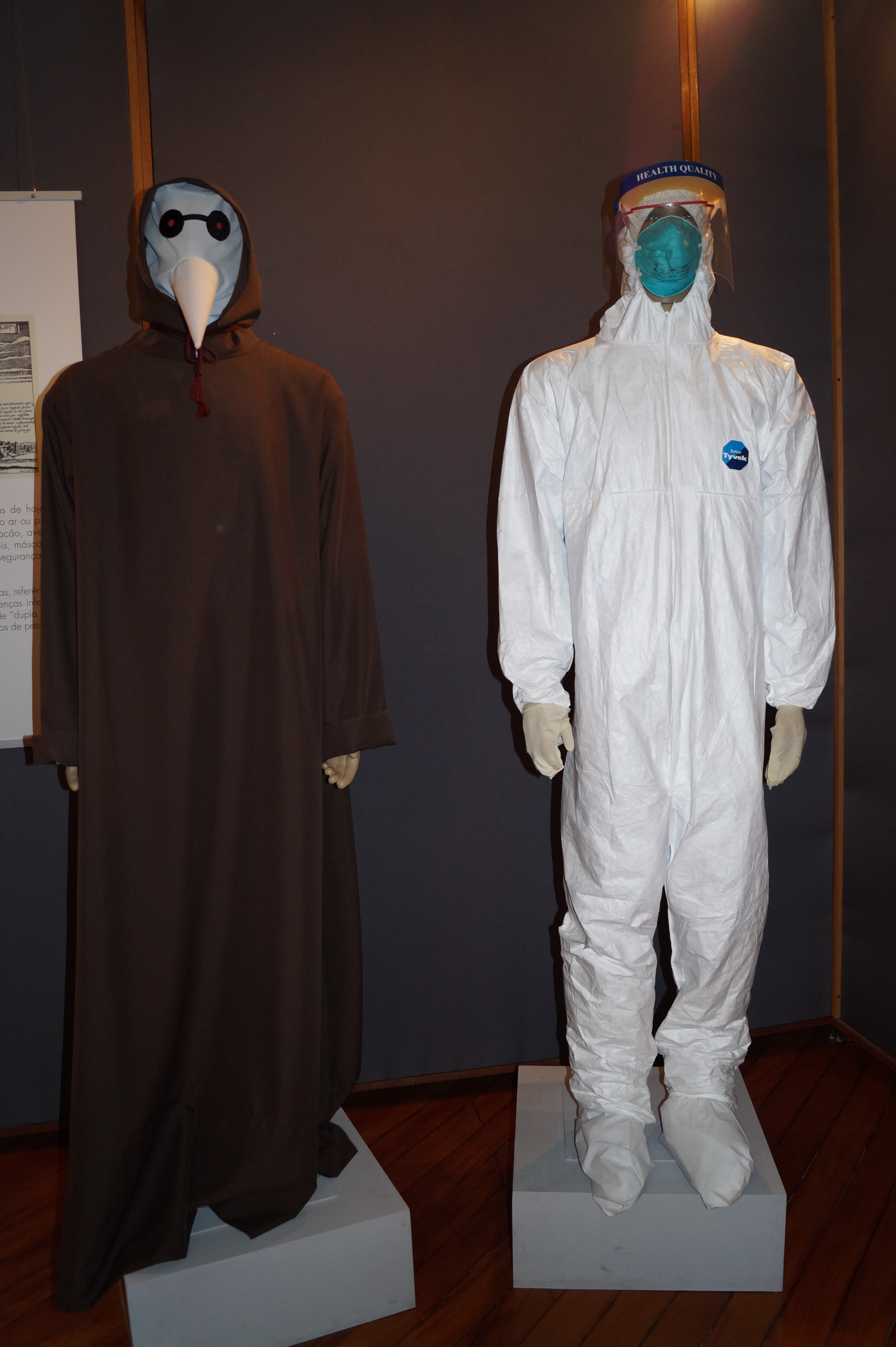 Exemplos da evolução das roupas usadas em casos de locais infectados com alguma doença, expostos no andar de cima do prédio do Desinfectório Central (Bom Retiro - São Paulo - SP), atual Museu Emílio Ribas.